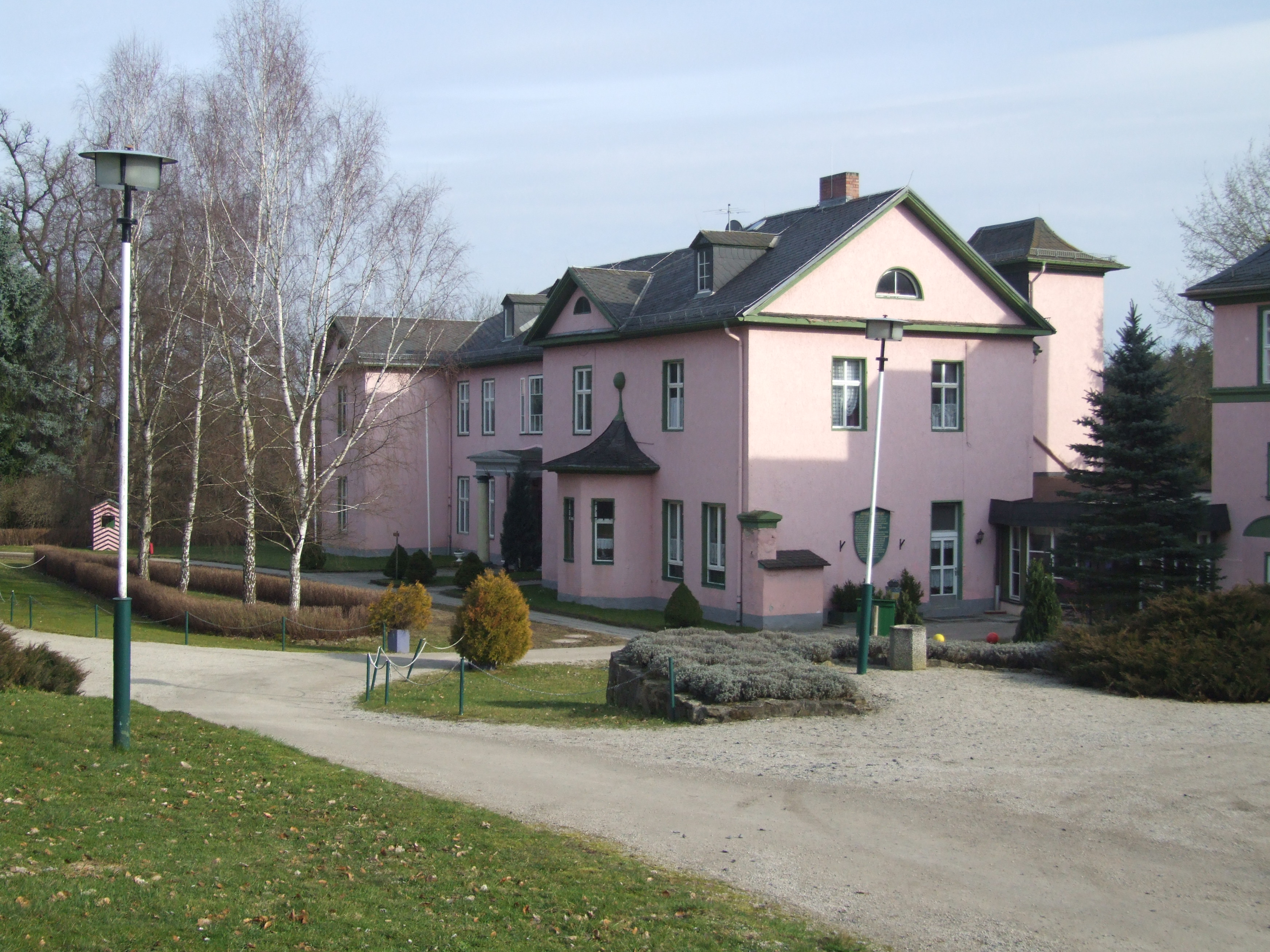 Altenheim HirschügelSchloss Hirschhügel Träger: Sozialwerk Heuser GmbH & Co. Erbaut: 1835-1838, erstmals erwähnt: 1428 Historie: Zum Besitz von Kochberg gehörte das Weideland am Haselbach. Es war ein durch Wall, Wassergraben und Bastionen geschütztes Vorwerk und wurde als "Kuhfraß" 1428 in einer Akte genannt. Von diesen Befestigungen ist heute kaum noch etwa vorhanden. James Patrick Parry hieß der reiche Irländer, der als Ehemann der Luise v. Stein akzeptiert wurde, nachdem er dem Altenburger Herzog einen Adelstitel abkaufte. Er baute das Schloss "Hirschhügel". Die Bezeichnung Hirschgrund für das Haselbachtal, Hirschbrunnen für den Eichenborn und Hirschwiese wurden von ihm geprägt.